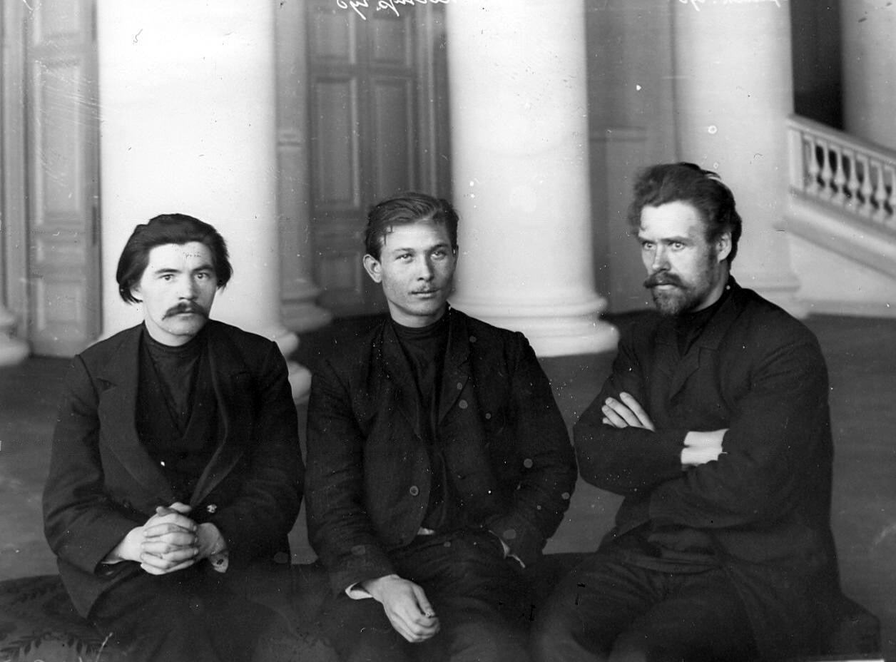 В.А.Чащин - от Пермской губернии, А.В.Калинин - от Костромской губернии и А. А. Шпагин (перм) в колонном зале Таврического дворца